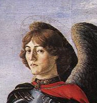 detail